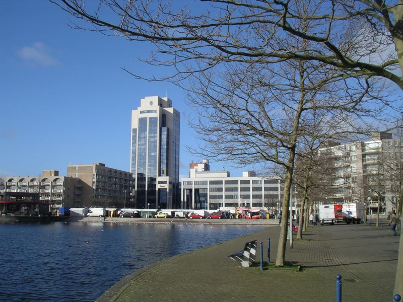 Foto van Dobbeplas, markt en stadshart Zoetermeer. Eiegn foto Caseman, 19 feb 2005